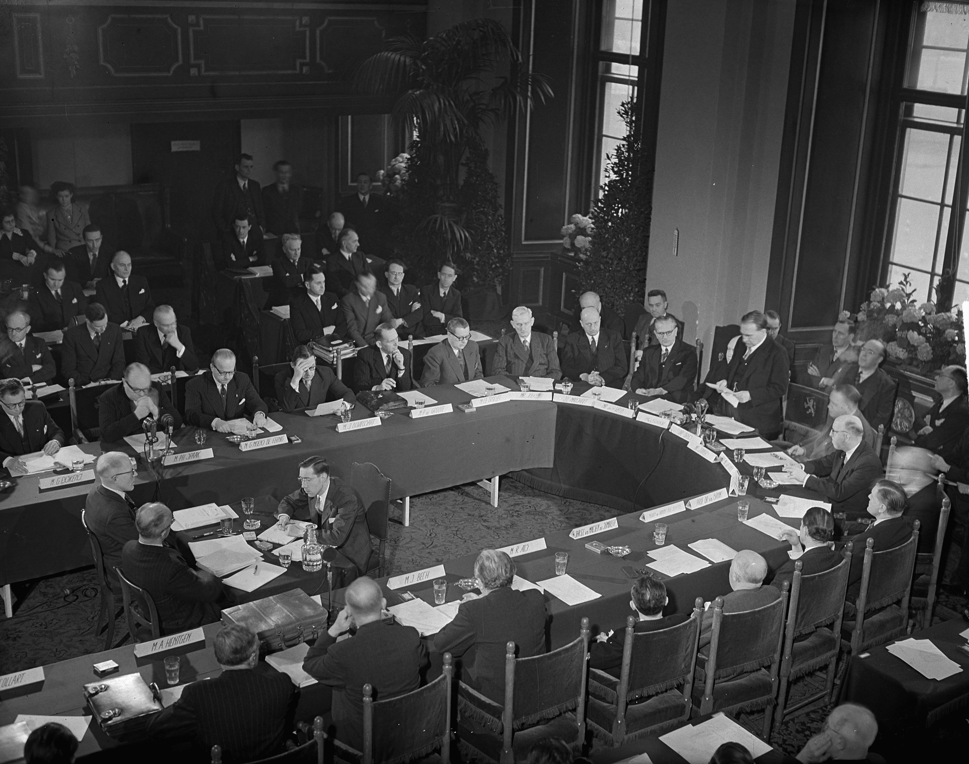 Collectie / Archief : Fotocollectie Anefo Reportage / Serie : [ onbekend ] Beschrijving : Benelux Conferentie 1e Kamer Den Haag. Opening rede Dr. W. Drees Datum : 10 maart 1949 Trefwoorden : KAMERS, Openingen, redes Persoonsnaam : Drees, W. Fotograaf : Noske, J.D. / Anefo Auteursrechthebbende : Nationaal Archief Materiaalsoort : Glasnegatief Nummer archiefinventaris : bekijk toegang 2.24.01.09 Bestanddeelnummer : 903-2602